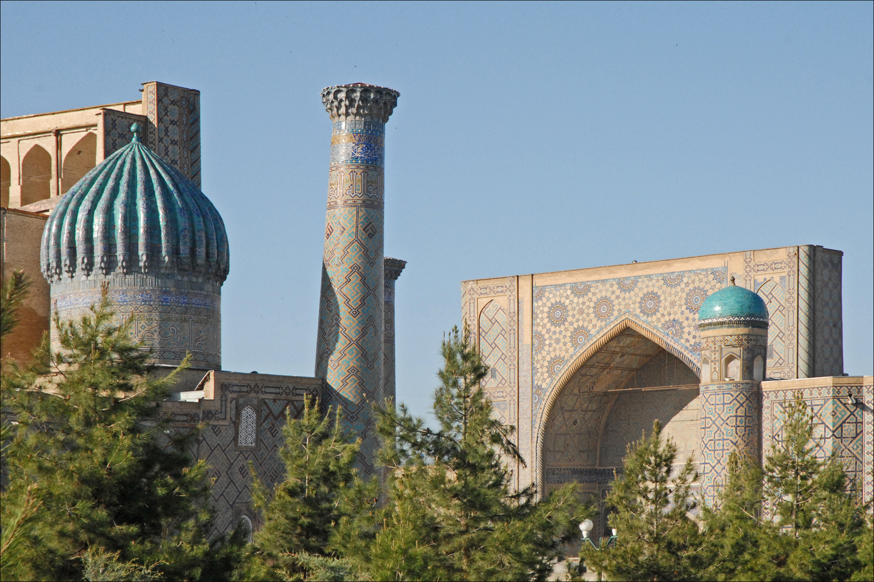 Le Registan est le coeur de la clté historique de Samarcande, une des principales villes de l'ancienne Route de la Soie. Le Régistan est constitué aujourd'hui d'une grande esplanade bordée de trois majestueuses madrasas décorées de majoliques aux motifs géométriques : Oulough Begh (à gauche), Chir Dor (à droite), Tilla Kari (en face). Le point de vue (lieu de la prise de photo panoramique, le matin) a été dégagé, au début du 20ème siècle par les soviétiques, de nombreux édifices qui encombraient le lieu, les grandes madrasas ont été restaurées. La madrasa Oulough Begh est la plus ancienne, elle a été construite entre 1417 et 1420. Elle est entourée de deux minarets de 33 m. Dès son ouverture, elle a été la plus grande université musulmane d'Asie centrale, sous l'impulsion d'Oulough Begh, on y enseignait le Coran mais aussi des matières non religieuses comme l'astronomie ou les mathématiques, ce qui n'a pas duré très longtemps car le fanatisme religieux a repris le dessus. La madrasa Chir Dor, à droite, a été construite entre 1619 et 1635. Le décor de son grand portail est célèbre car il comprend des représentations d'animaux (tigre-lion portant le soleil, symbole de l'ancien zoroastrisme, la religion précédent l'Islam) ce qui est normalement interdit par l'Islam. Les deux coupoles turquoises et vertes, en bulbe cannelé, sont caractéristiques du style architectural de Samarcande. La madrasa Tilla Kari (au fond, au nord) est structurellement différente des deux autres. Hormis sa façade plus longue montrant les cellules des étudiants de la madrasa, (dans les autres édifices, les cellules donnent sur la cour intérieure), elle possède une coupole bleue qui couvre la mosquée se trouvant à l'intérieur du bâtiment. Elle a été construite entre 1646 et 1659. article de Wikipedia